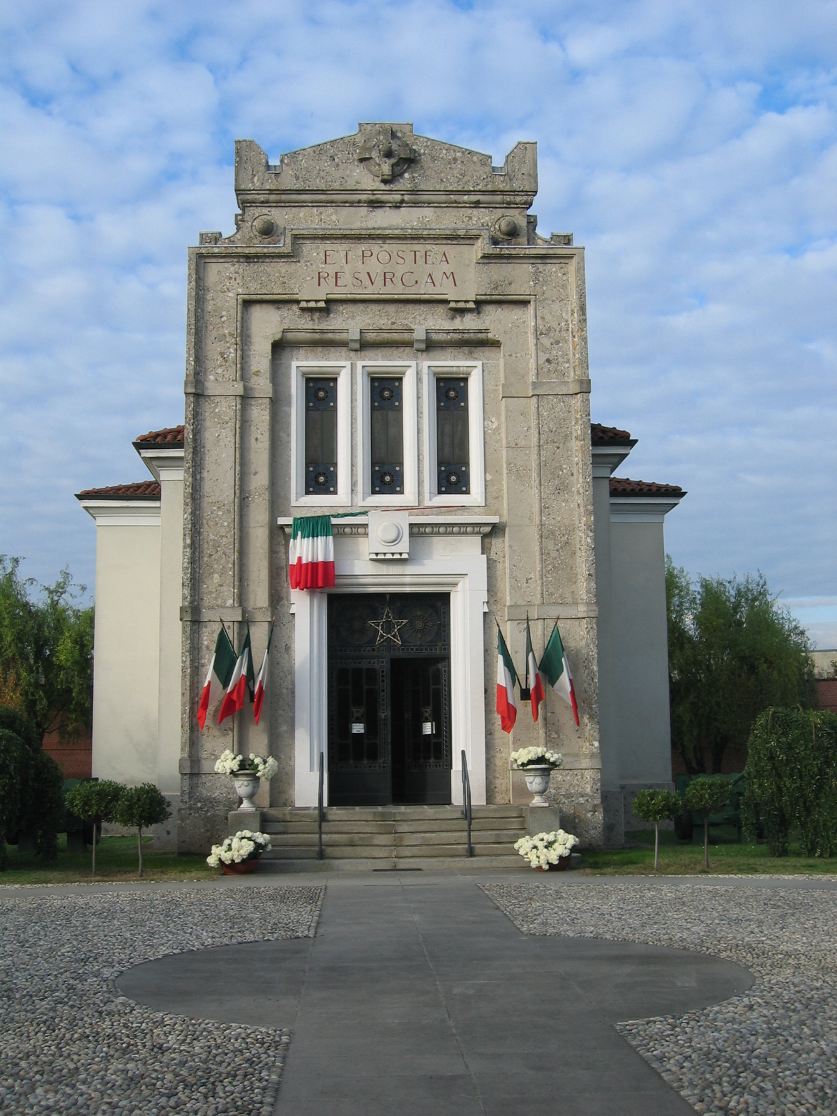 La cappella dei caduti del cimitero di Treviglio così come si presenta nei giorni di festa.